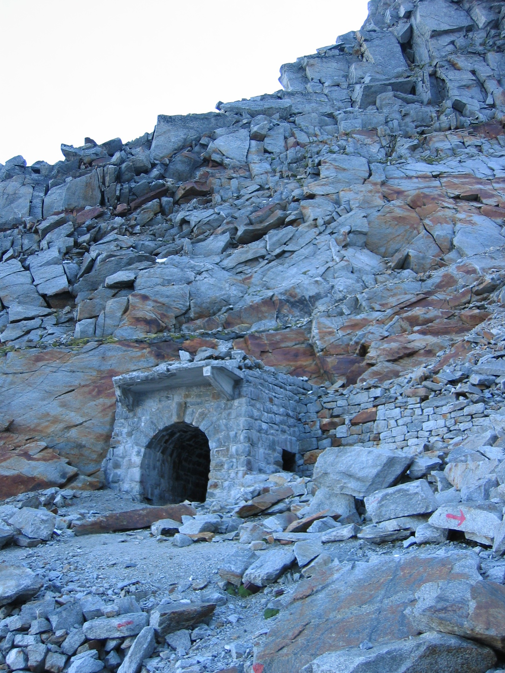 Molybdänbergwerk unterhalb der Alpeiner Scharte, Tirol, Österreich